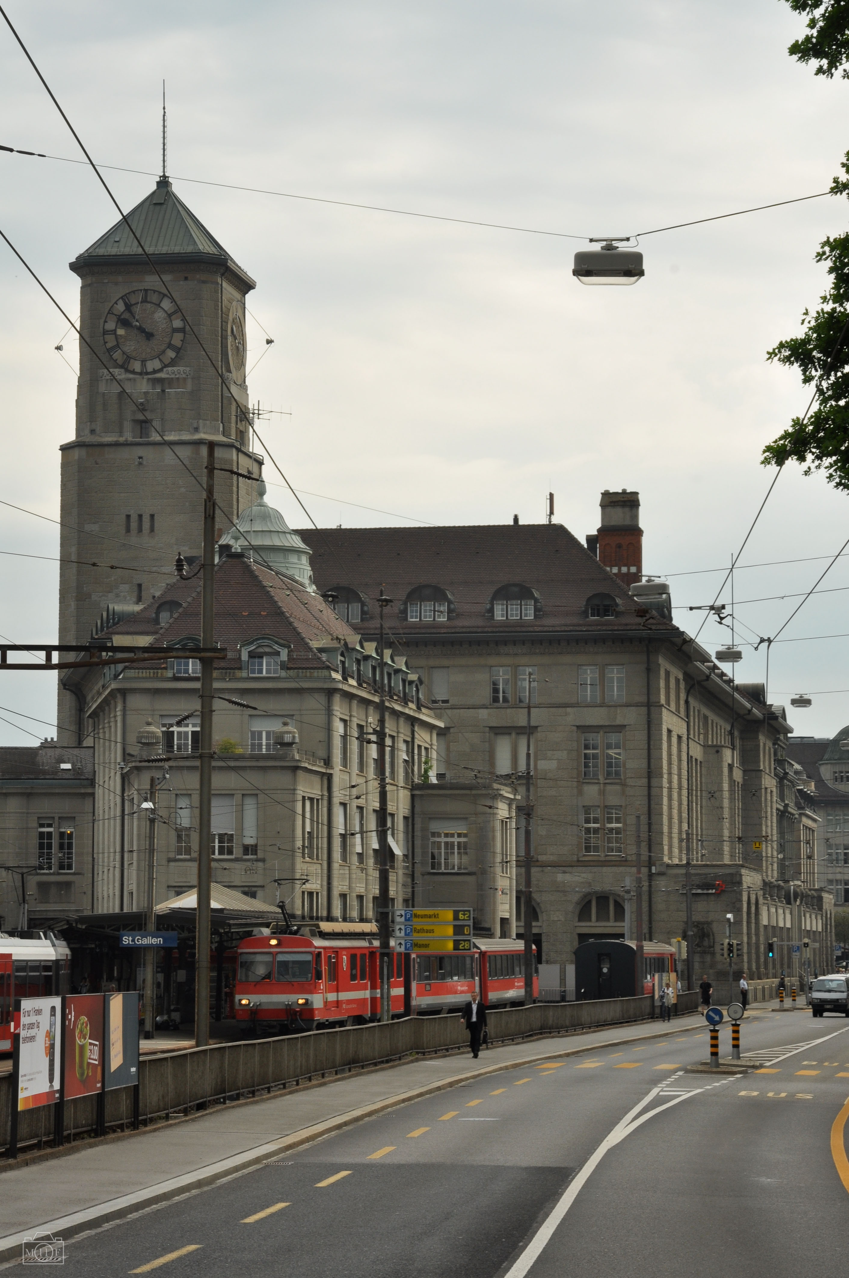 die Appenzeller Seite vom St.Galler Bahnhof mit BDeh 4/4 11, links ein Be 4/8 31-34 der Trogener Bahn